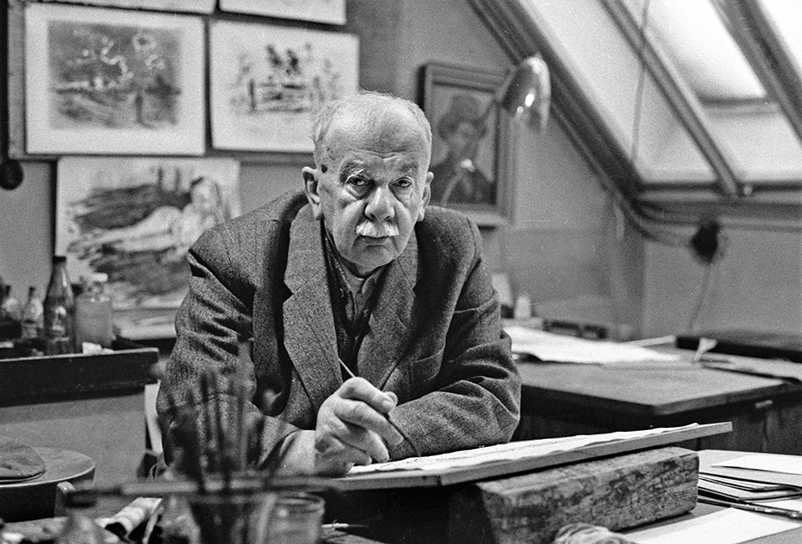 Jan Šplíchal, portrét Vojtěcha Sedláčka